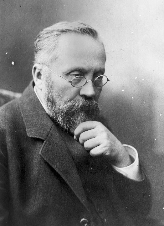 Портретна снимка на Наполеон Цибулски, полски лекар физиолог и университетски преподавател.